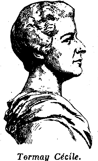 Tormay Cécile írónő portréja